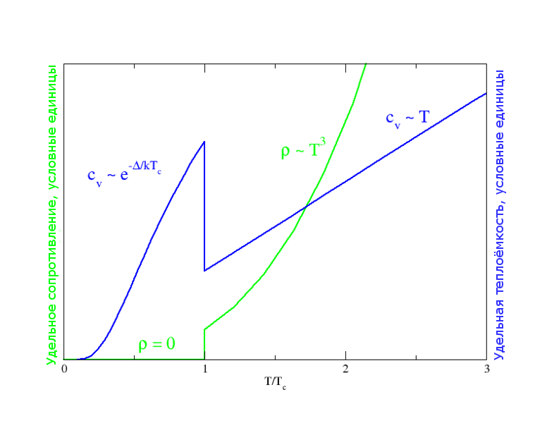 Сверхпроводимость23